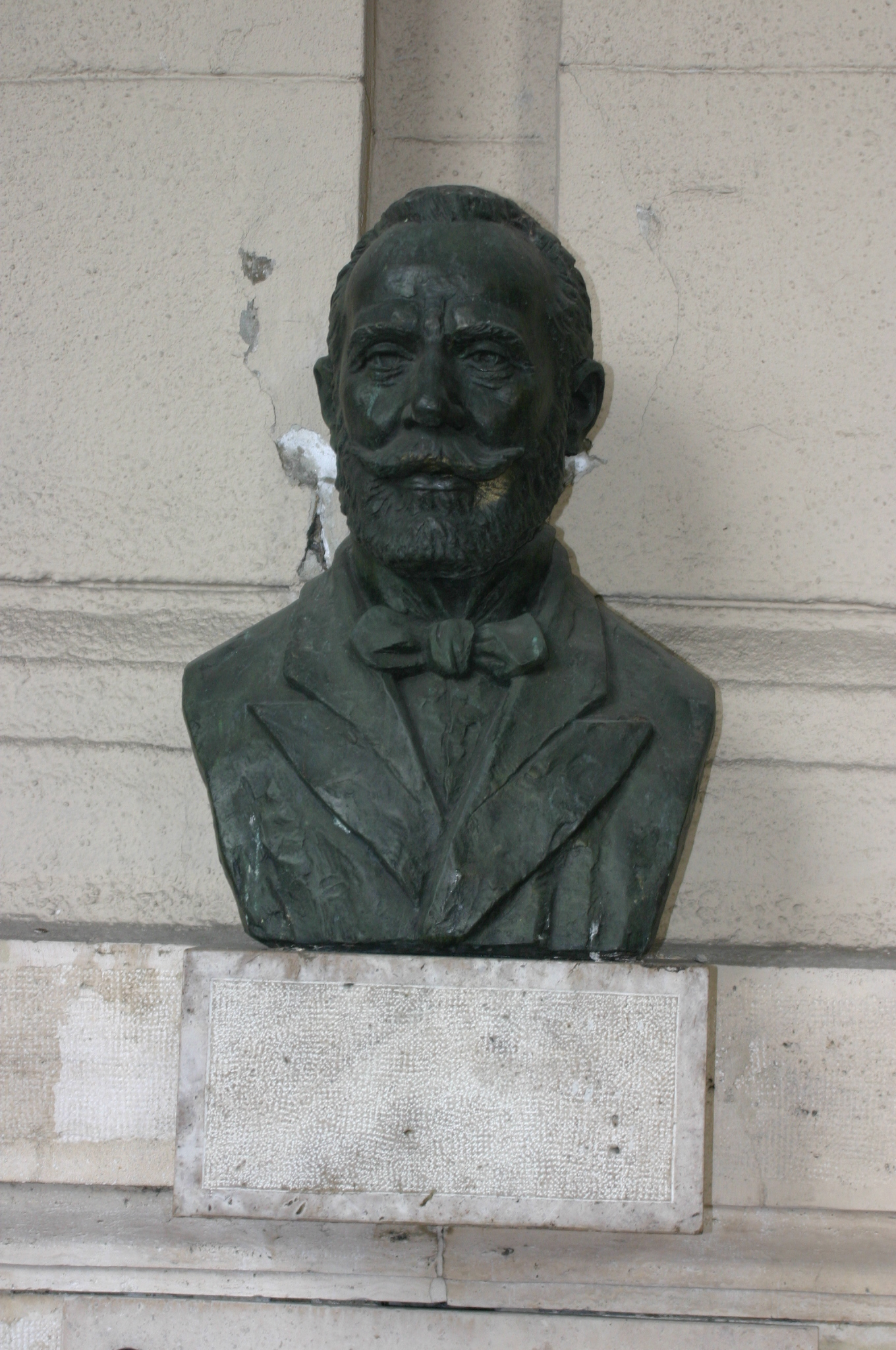 bust of Kosutány Tamás